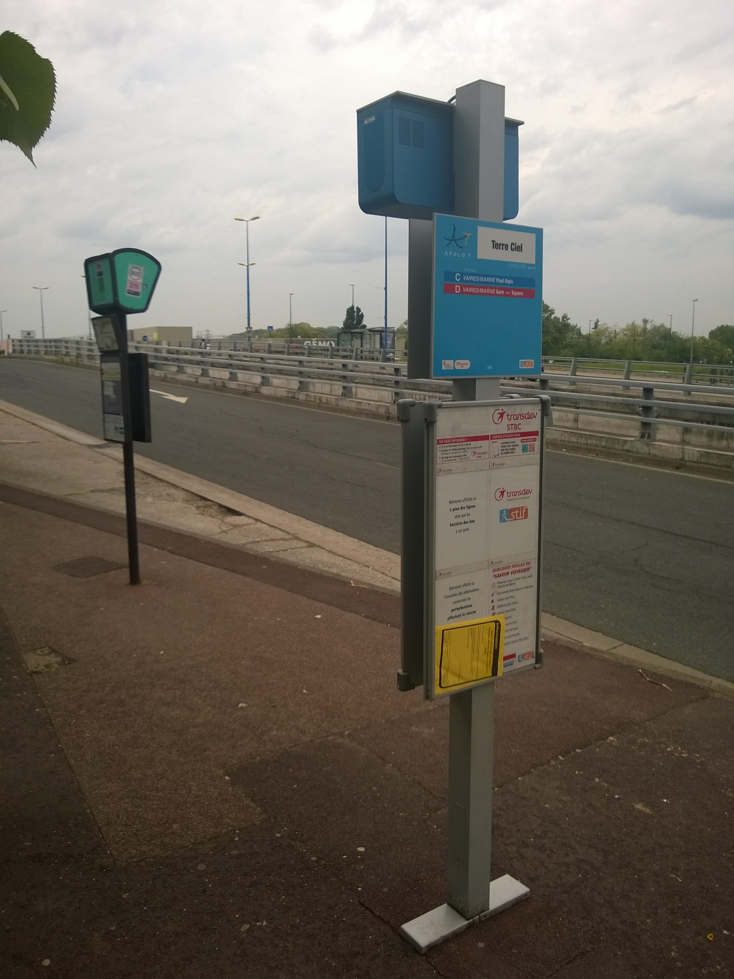 Un totem du réseau Apolo7, inutilisé depuis la restructuration d'avril 2018 et en arrière-plan, celui de la ligne 211 de la RATP, à l'arrêt Terre Ciel, département de la Seine-et-Marne, France..